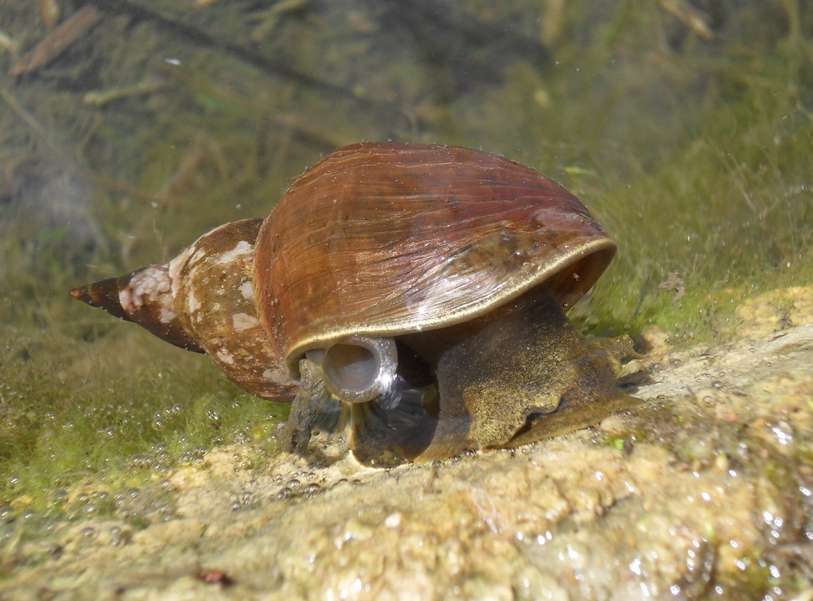 Grande lymnée (Lymnea stagnalis) à l'Arboretum de Paris.